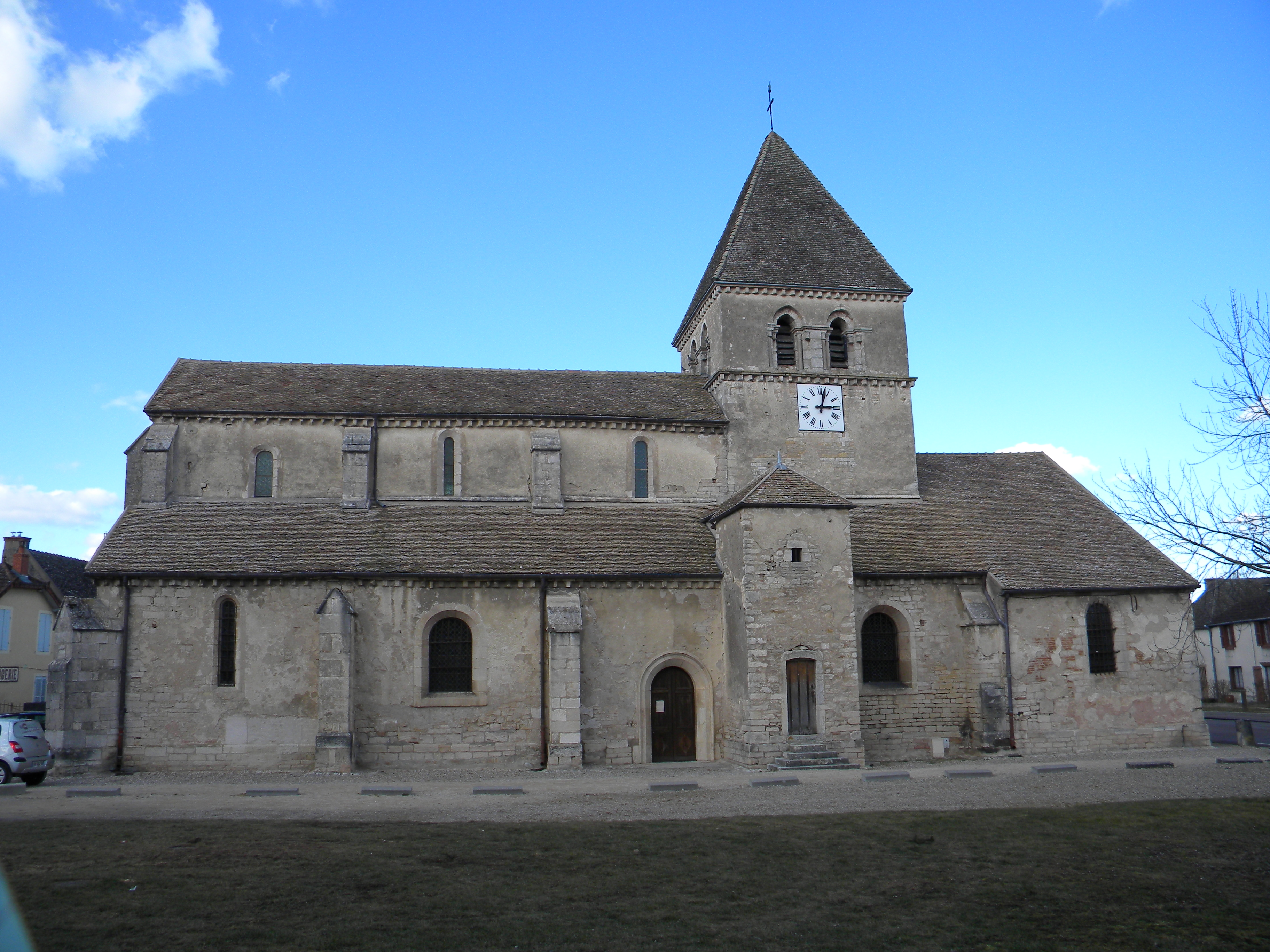 Église